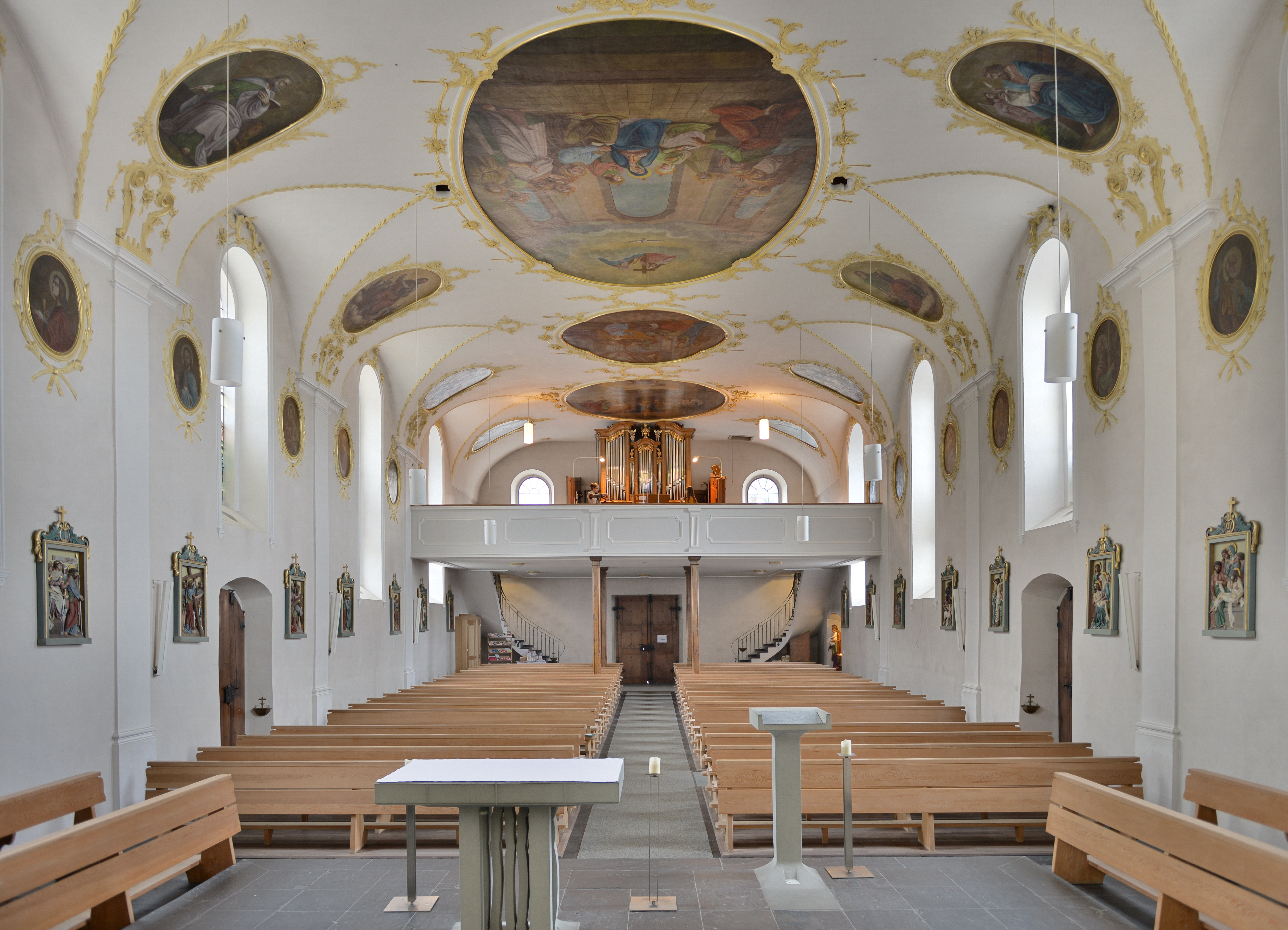 Hl. Petrus&Paulus Pfarrkirche der Gemeinde Andelsbuch